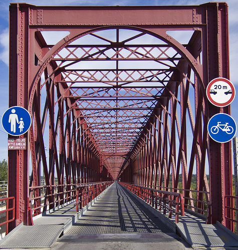 Ponte Rainha Dona Amélia, Muge, Portugal.